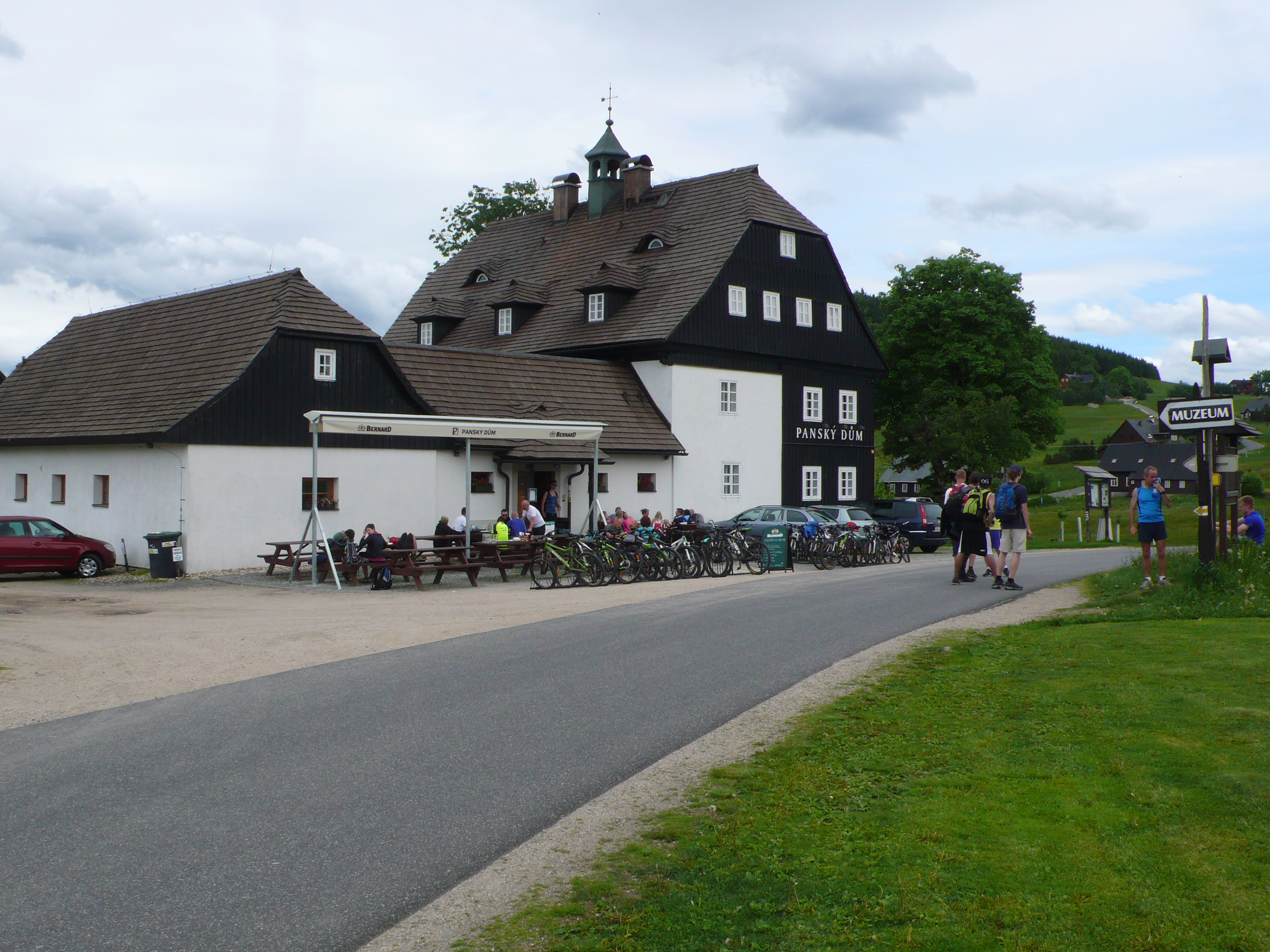 Panský dům v osadě Jizerka (2016)